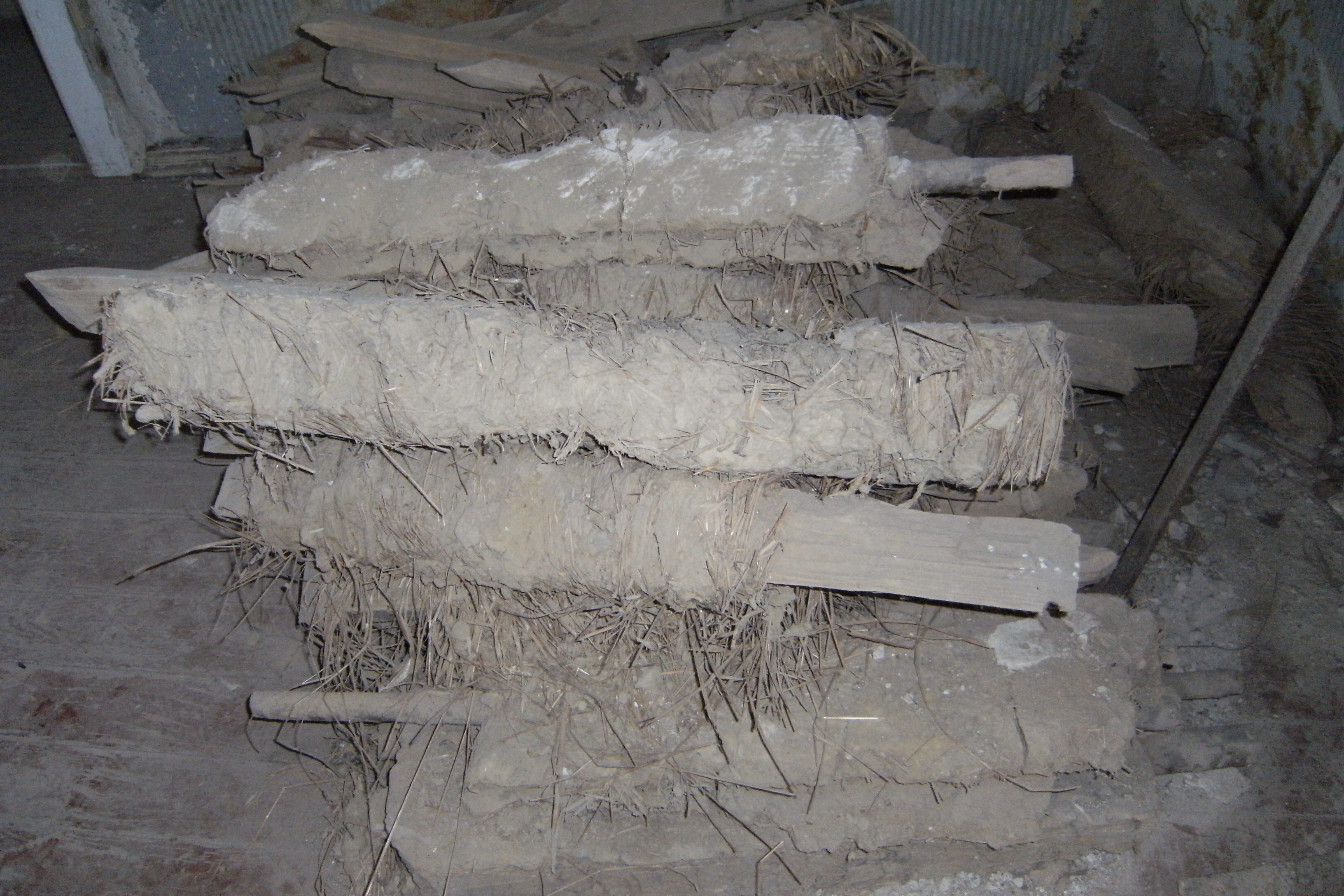 Lehmstaken (Knüppel, Stroh und Lehm) ausgebaut im Schloss Quilow